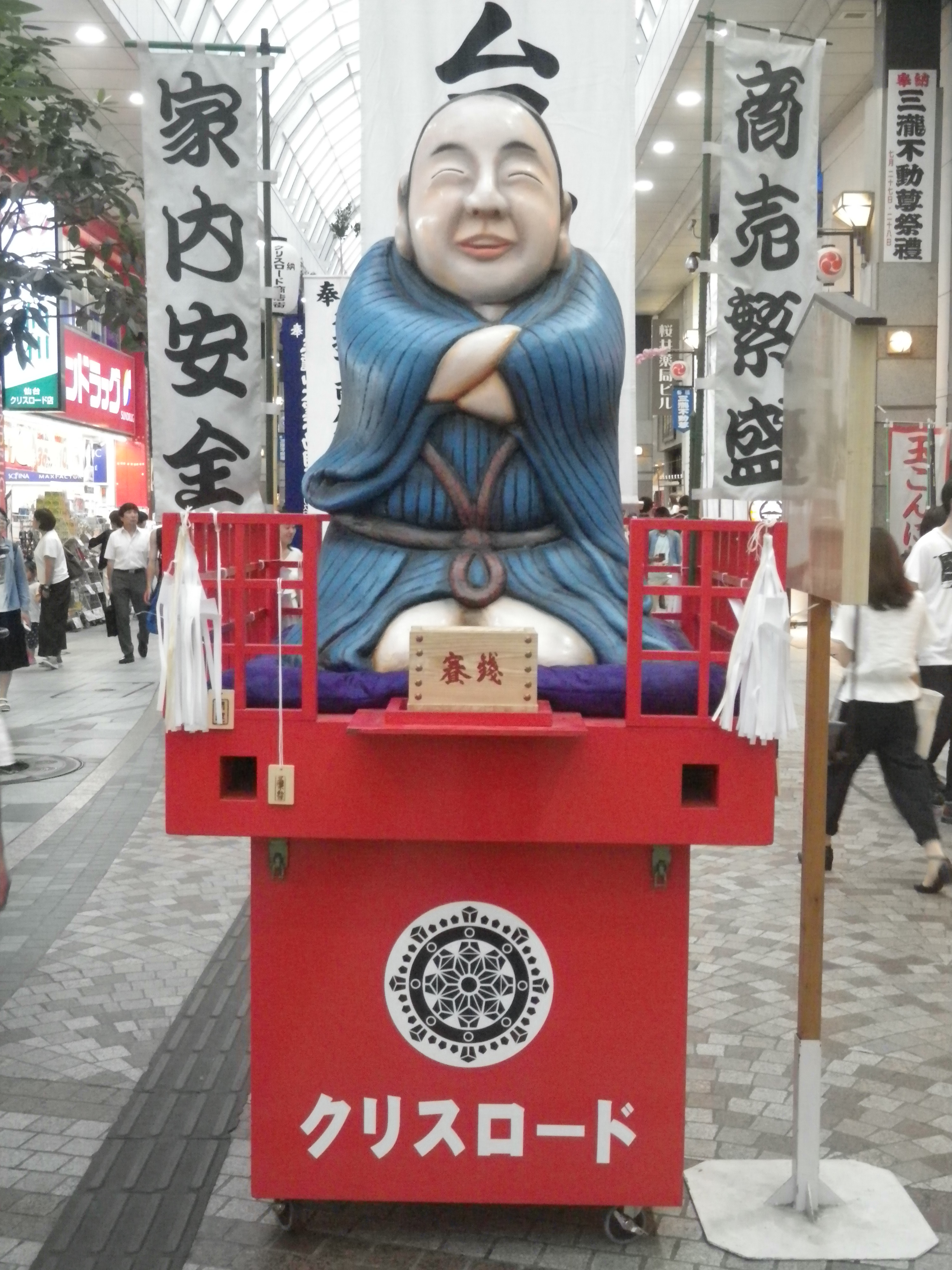 三瀧山不動尊奉納夏祭りで繰り出される仙台四郎の山車。